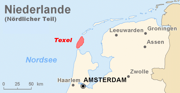 Karte der nördlichen Niederlande, die Insel Texel ist markiert.